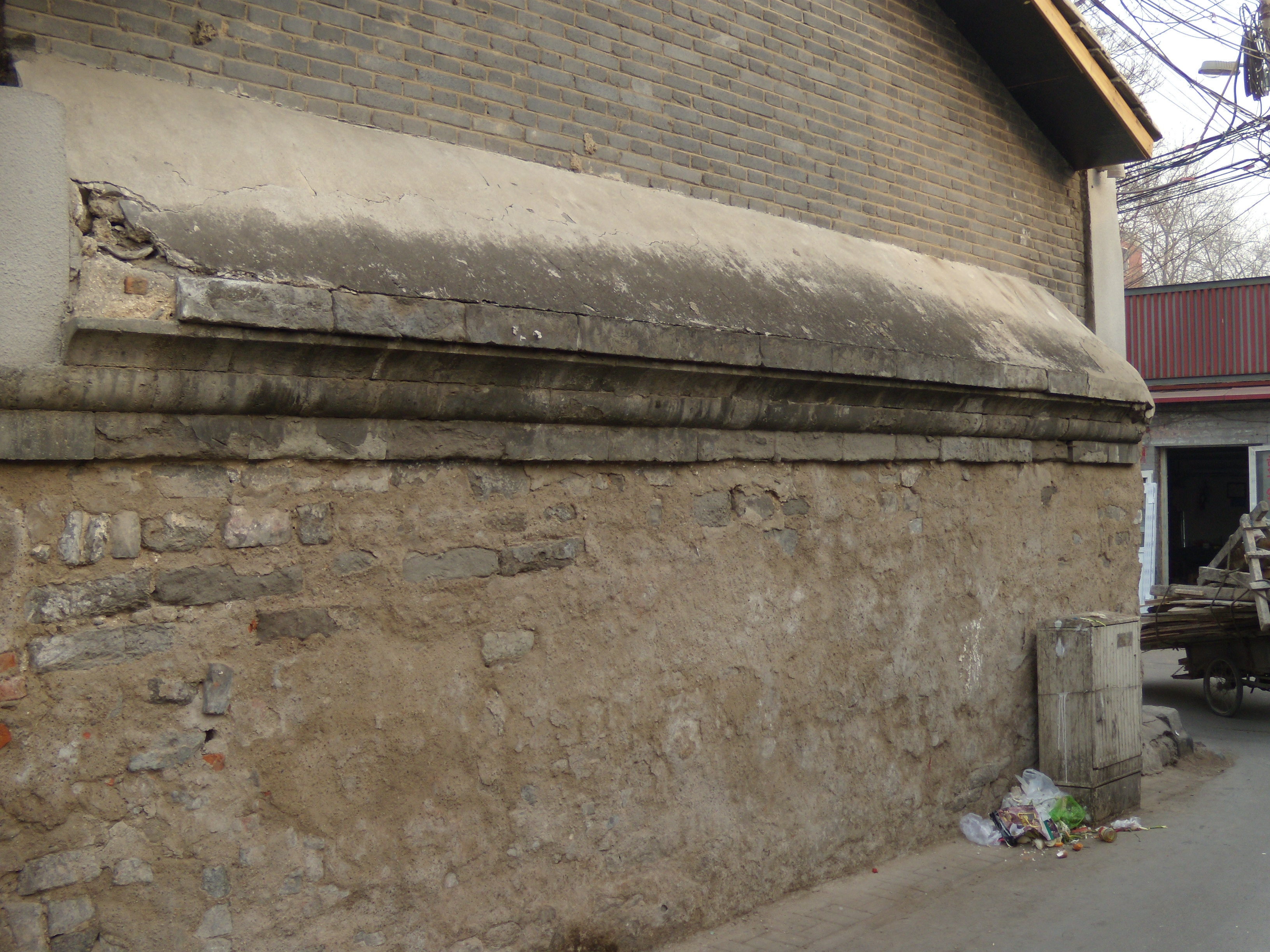 智珠寺山门前方西南侧的院墙，南北走向，位于嵩祝院西巷南端的拐角处